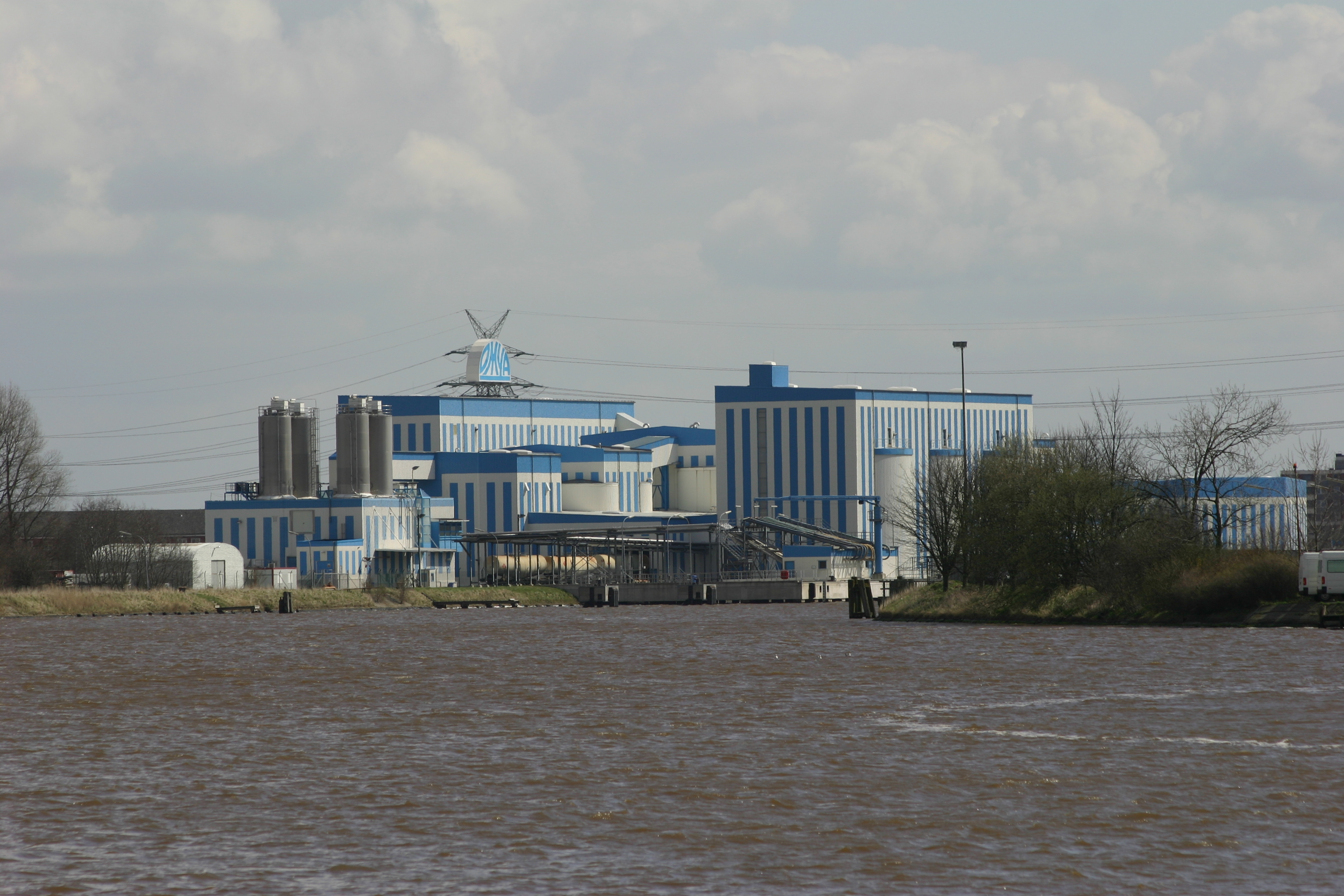 OMYA-Werk im Hafen von Emden, Ostfriesland, Niedersachsen